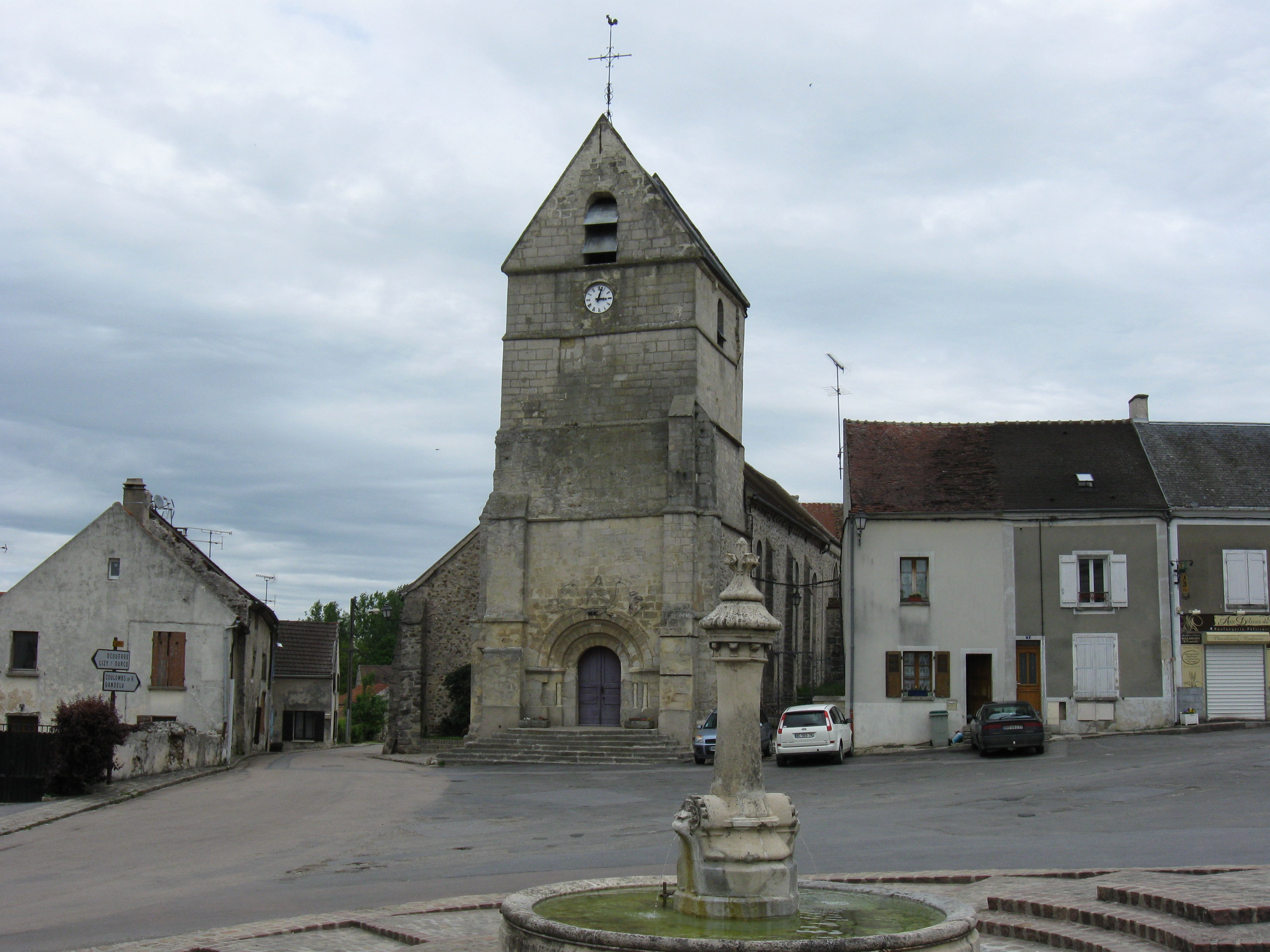 Église Saint-Julien-et-Saint-Jean-Baptiste et la fontaine de la Place de l'église. (Vendrest, département de la Seine-et-Marne, région Île-de-France).